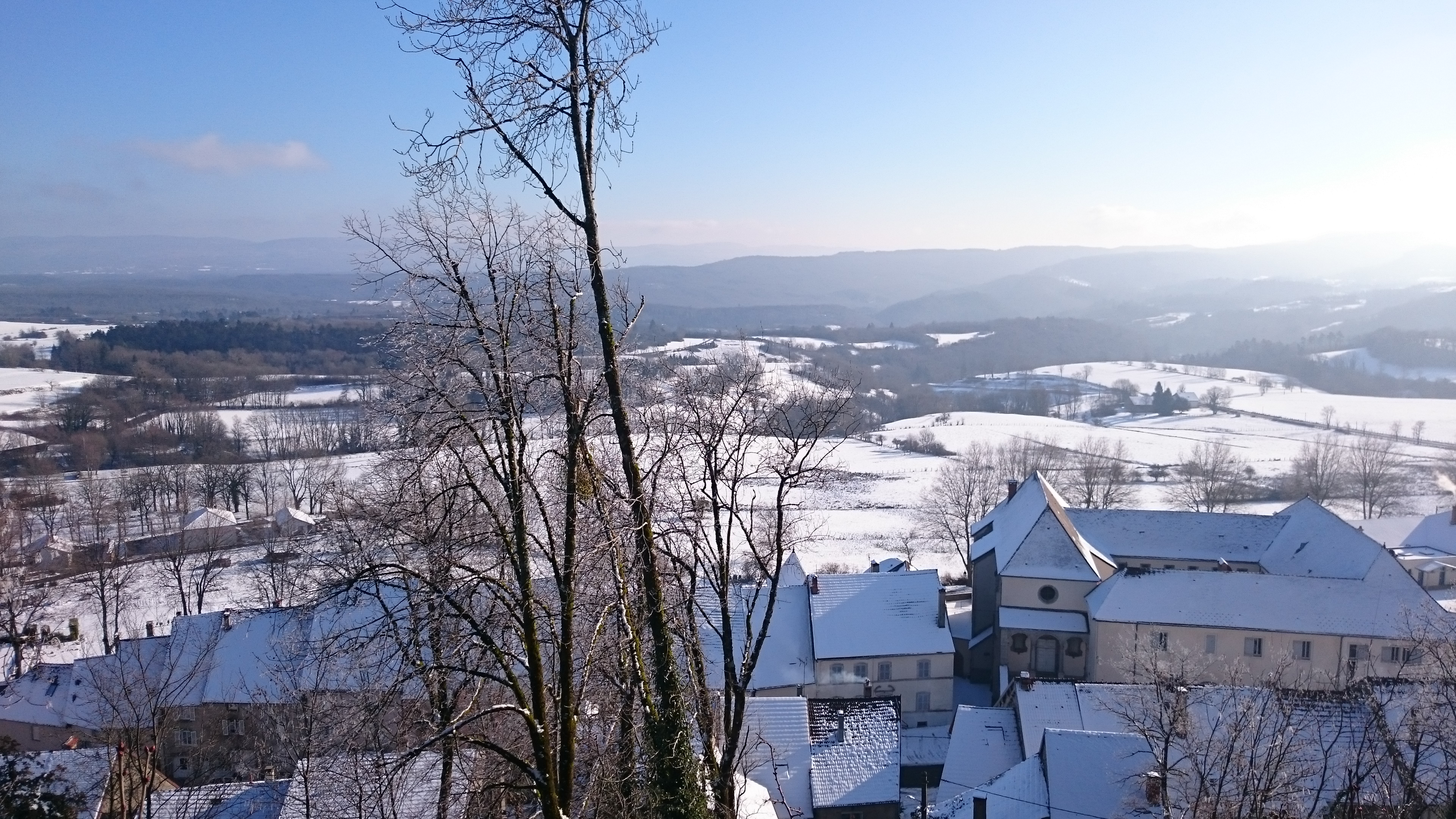 Vue depuis les hauts de Orgelet